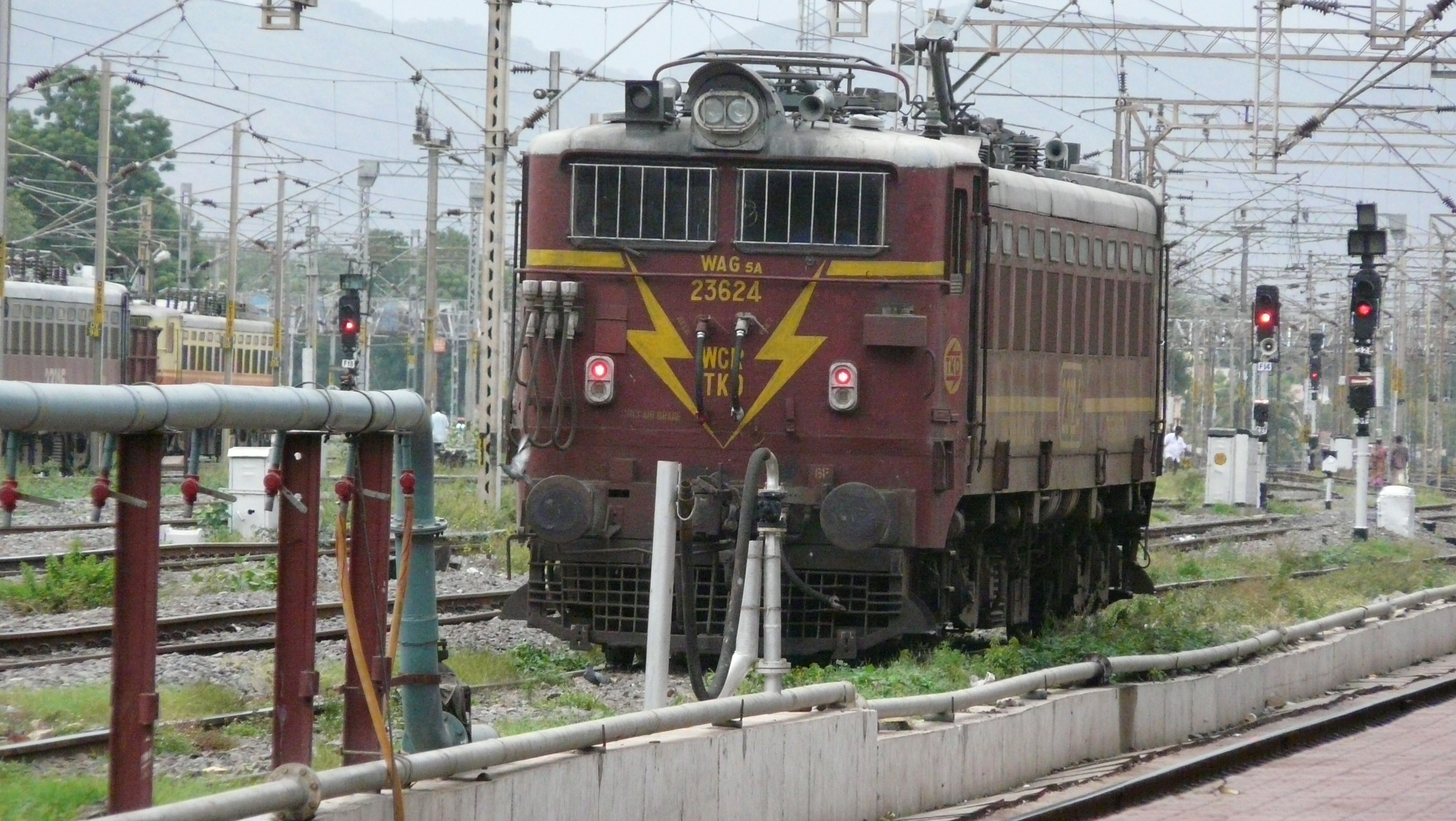 Vijayawada Junction